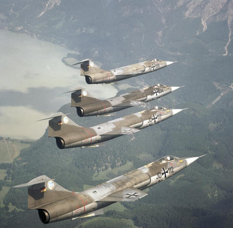 Reportage Bundeswehr: JG 74 (Jagdgeschwader)